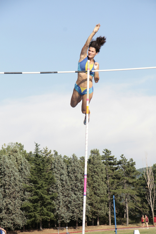 Scattata da Nefersaur sequenza pole vault 9 (Anna Giordano Bruno) Licenza